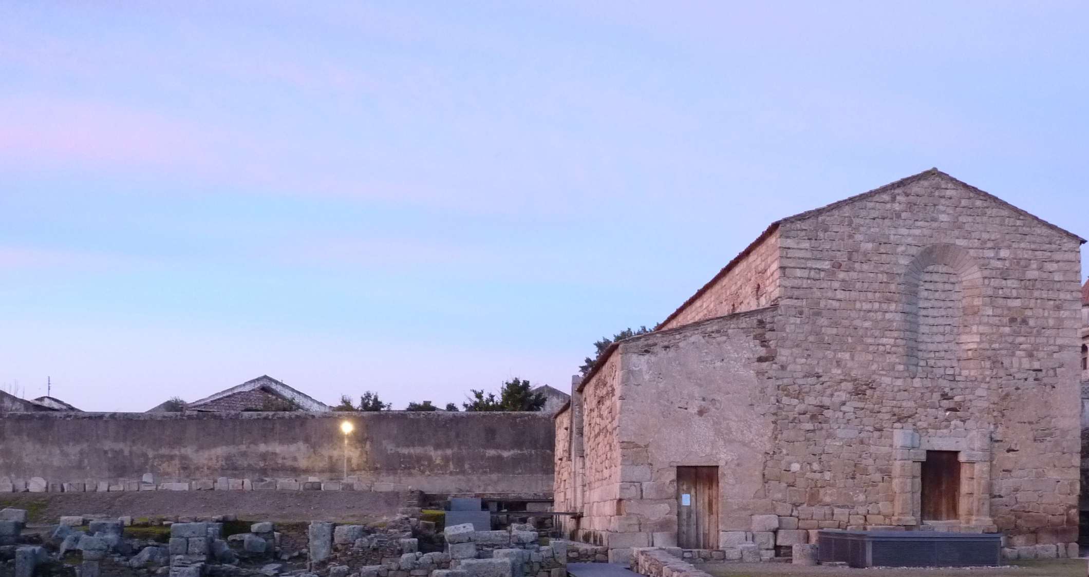 Conjunto arquitectónico e arqueológico de Idanha-a-Velha Inclui a denominada Catedral de Idanha-a-Velha This file was uploaded for Wiki Loves Monuments in Portugal with the unique identifier 70554.